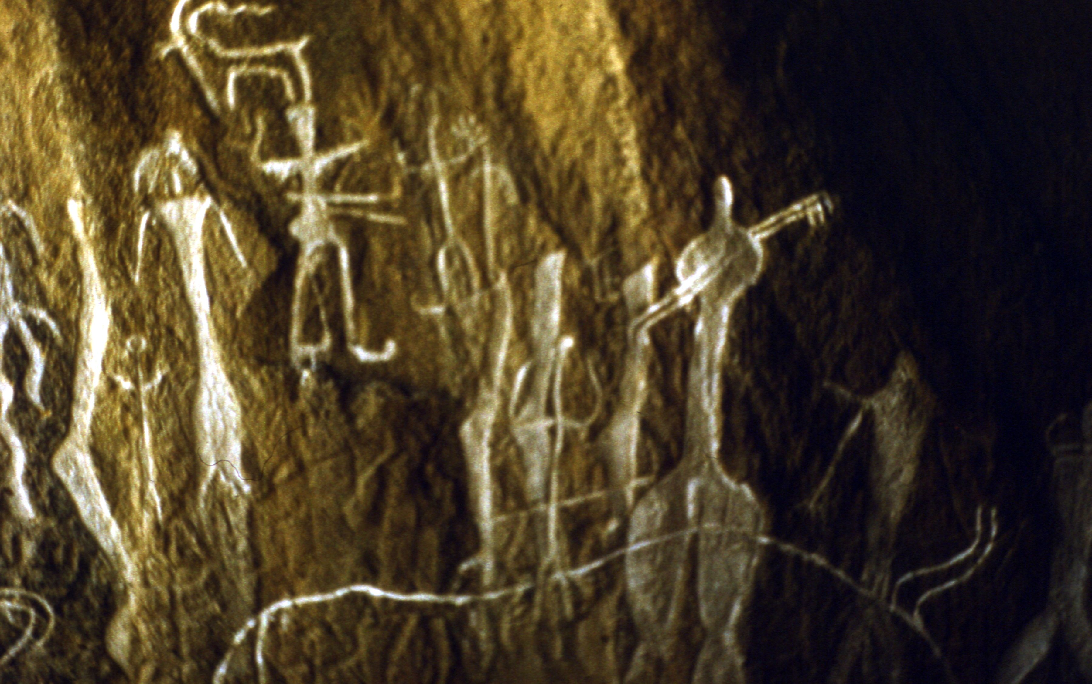 Aserbaidschan 1987